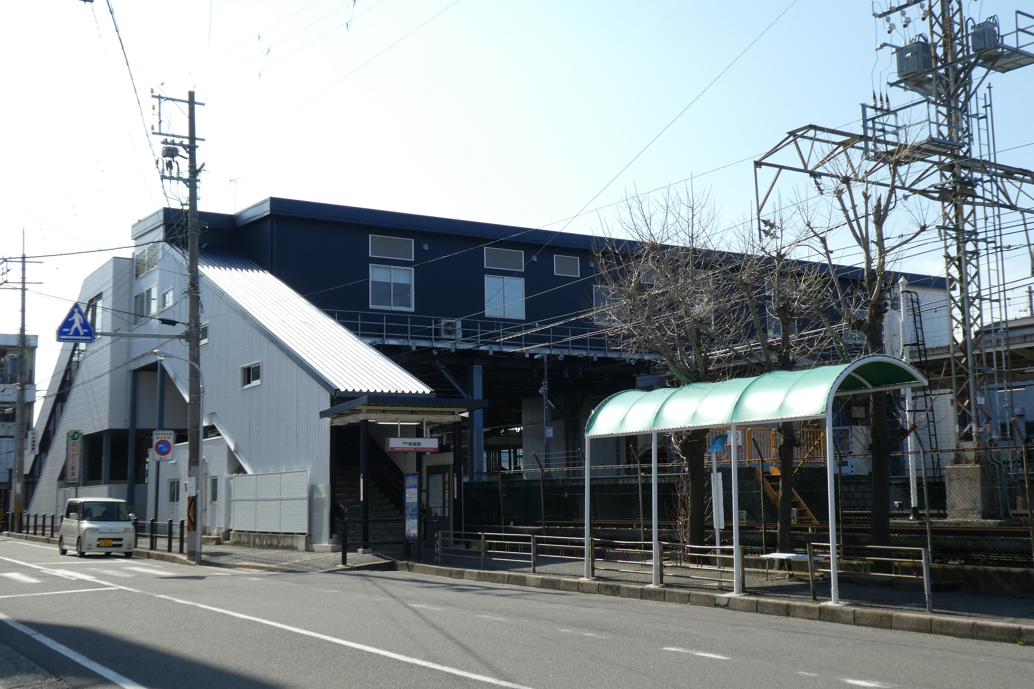 尾崎駅東口。2019年に再建された駅舎。